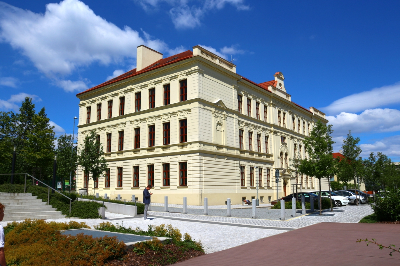 Budova křesťanské školy Elijáš